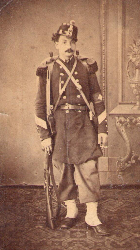 Chasseur d'infanterie, bataillon 60, uniforme selon l'ordonnance de 1861. Armé du fusil Vetterli modèle 1871.